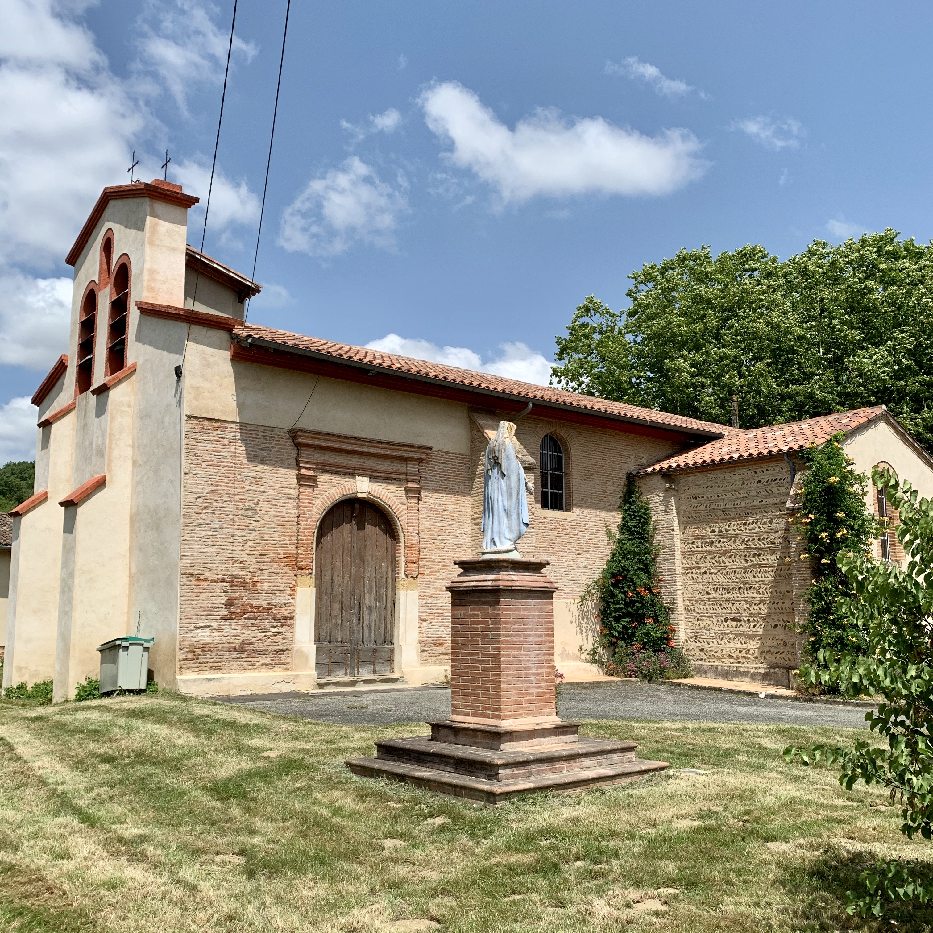 Église Sainte-Marie-Madeleine de Saiguède en Haute-Garonne (France)